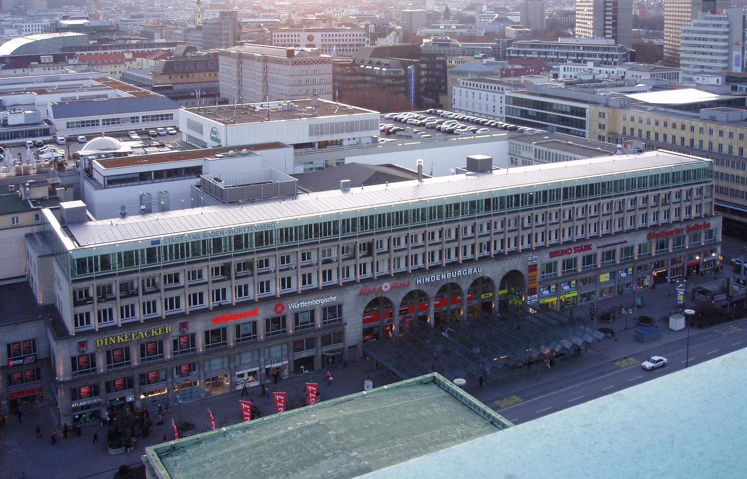 Hindenburgbau in Stuttgart, fotografiert vom Bahnhofsturm aus